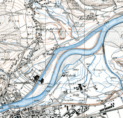 Darstellung des Kraftwerk der Zementfabrik Zurlinden & Co. im Rüchlig und des Kraftwerks der Chocolat Freqy A.G auf der Siegfriedkarte. Datenstand 1931